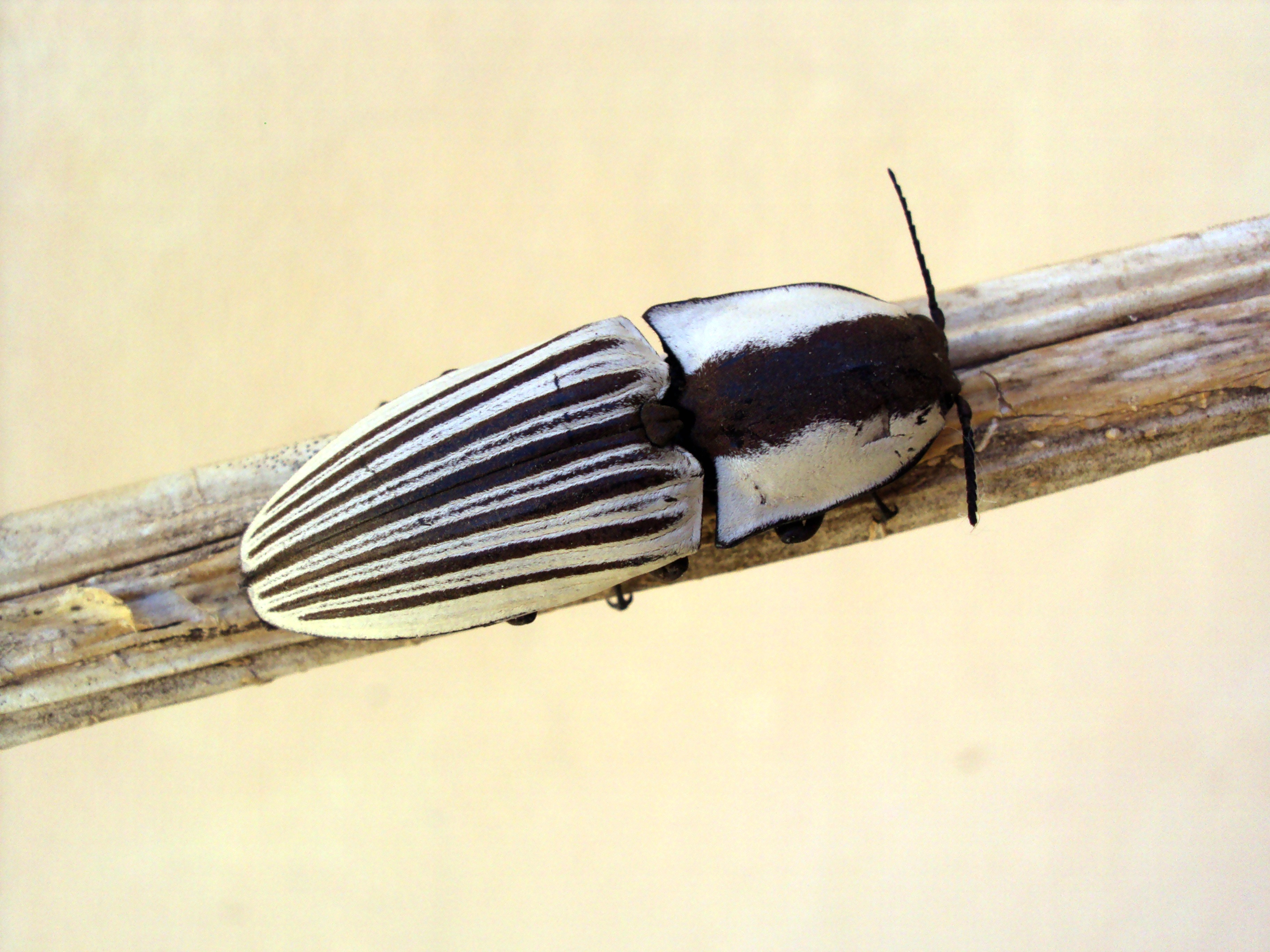 Chalcolepidius limbatus en Argentina